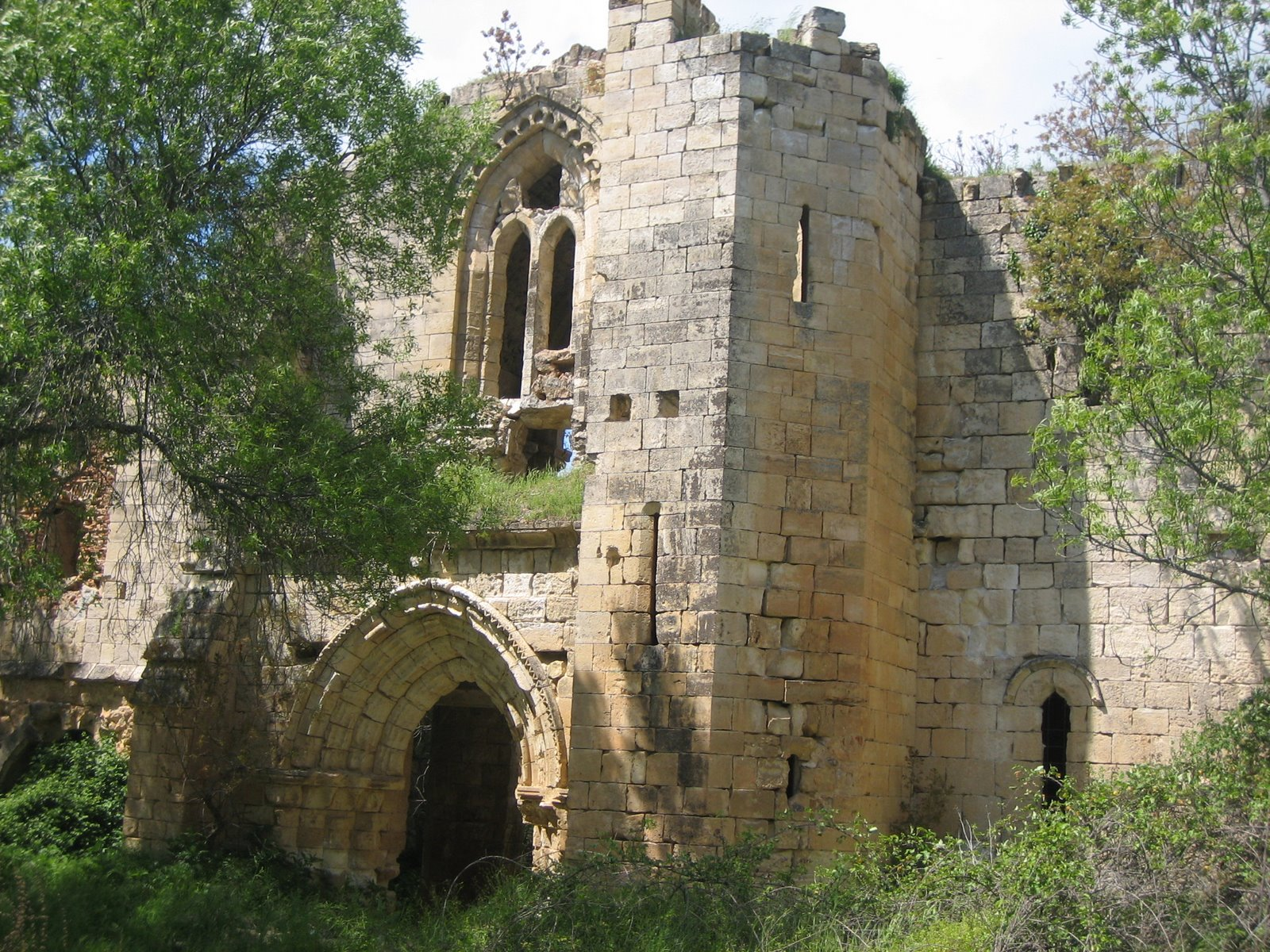 Monasterio de Bonaval situado en el municipio español de Retiendas (Guadalajara).